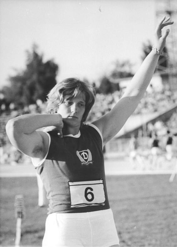 Marianne Adam ADN-ZB Reiche 06.08.1975 Berlin: Marianne Adam mit Weltrekord! Bei der Endrunde um den DVfL-Pokal der Leichtathleten im Berliner Jahn-Sportpark verbesserte die Berliner Kugelstoßerin Marianne Adam am Nachmittag des 06.08. den Weltrekord auf 21,60 m. (Vergl. ADN-Meldung v. 06.08.)